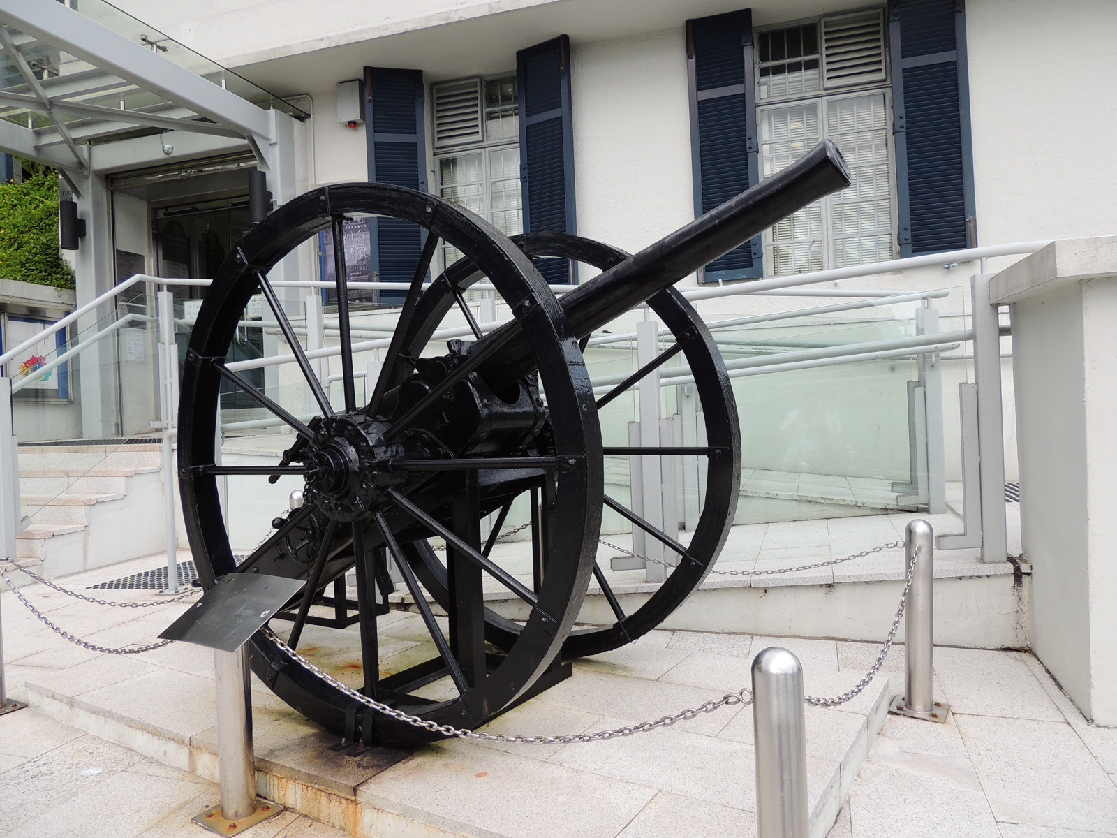 Field Gun, Hong Kong Police Museum